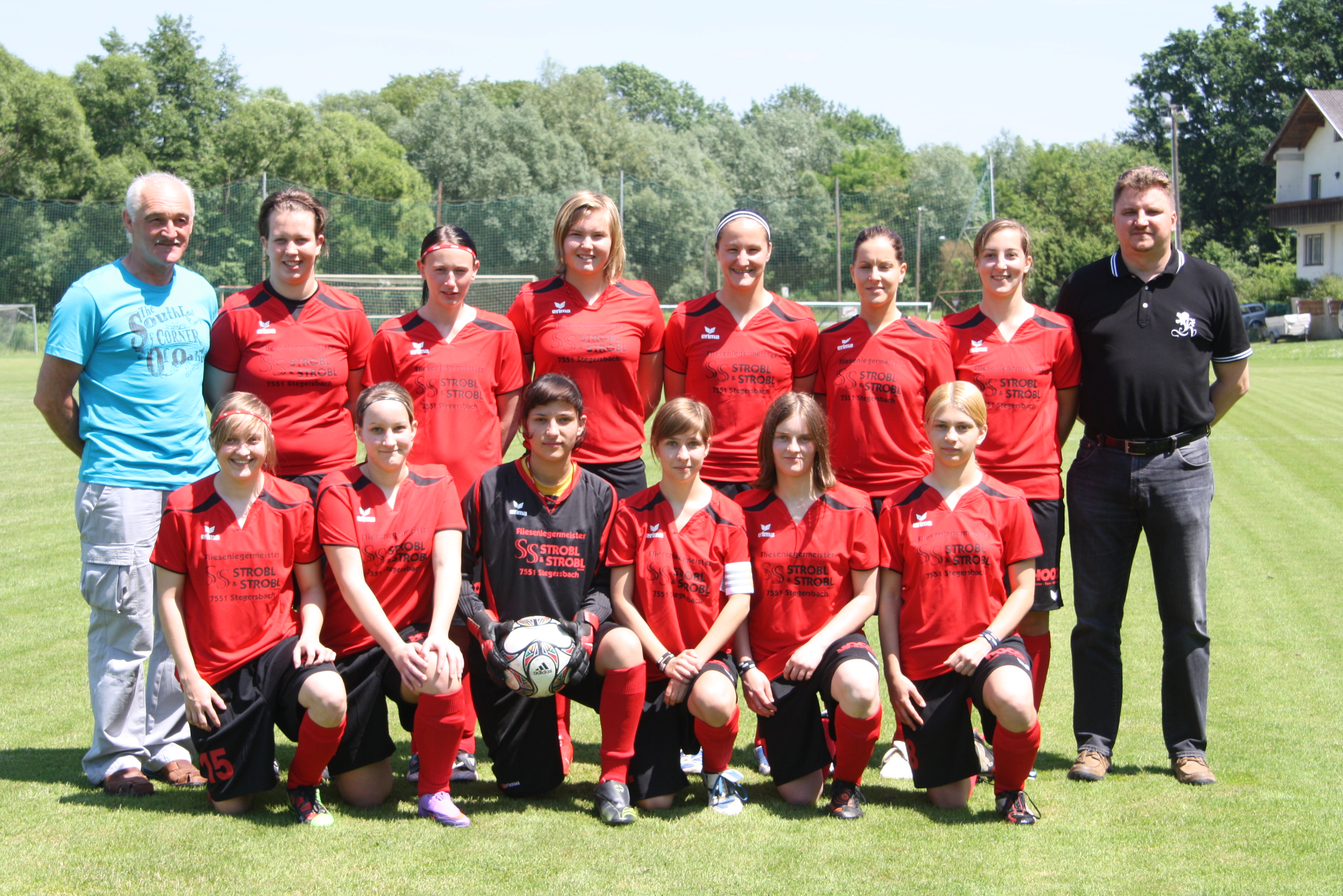 Mannschaft FC Südburgenland, 2. Frauenliga Süd